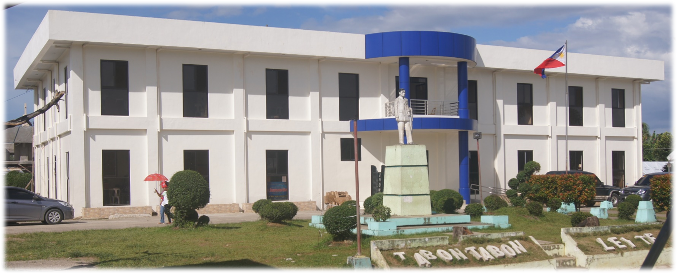 Winaray : Munisipyo han Tabontabon, Leyte